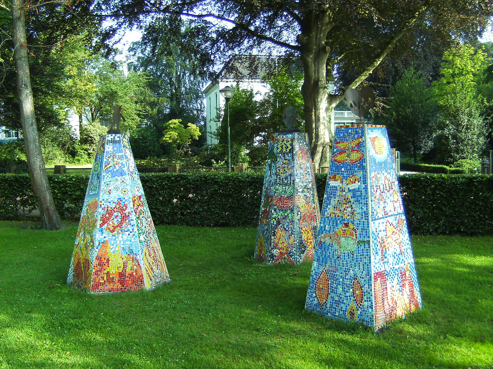 'Vuurzuilen' uit 2007. Drie zuilen 4, 6, en 8 kantig, beton bekleed met mozaieken van keramieksteentjes en glas. Ontworpen en gemaakt door kinderen van drie basisscholen uit Bathmen olv kunstenares Jacomijn Schellevis. In het plantsoen bij het voormalige raadhuis.